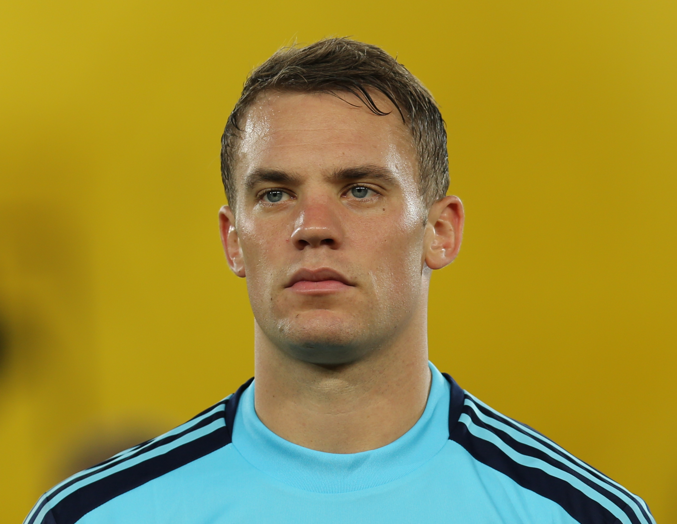 Fußball-Weltmeisterschaft 2014/Qualifikation (UEFA), Gruppe C, 11. September 2012, Österreich gegen Deutschland im Wiener Ernst-Happel-Stadion. The making of this work was supported by Wikimedia Austria. For other files made with the support of Wikimedia Austria, please see the category Supported by Wikimedia Österreich.